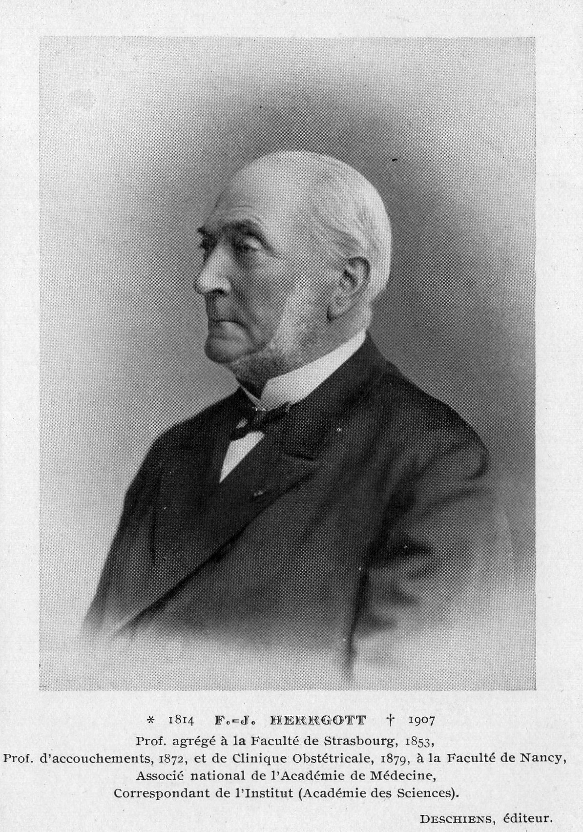 Foto di François Joseph Herrgott, docente presso l'università di Strasburgo (1853), prof. di Clinica Ostetrica presso la facoltà di Medicina di Nancy (1879)